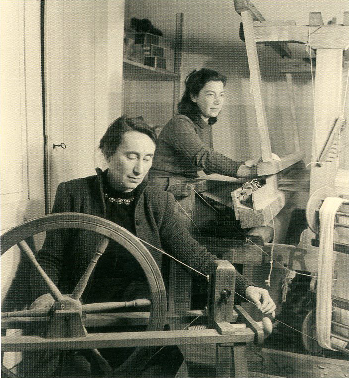 יוליה קיינר, מחלקת האריגה, 1950. צילום: ורנר בראון